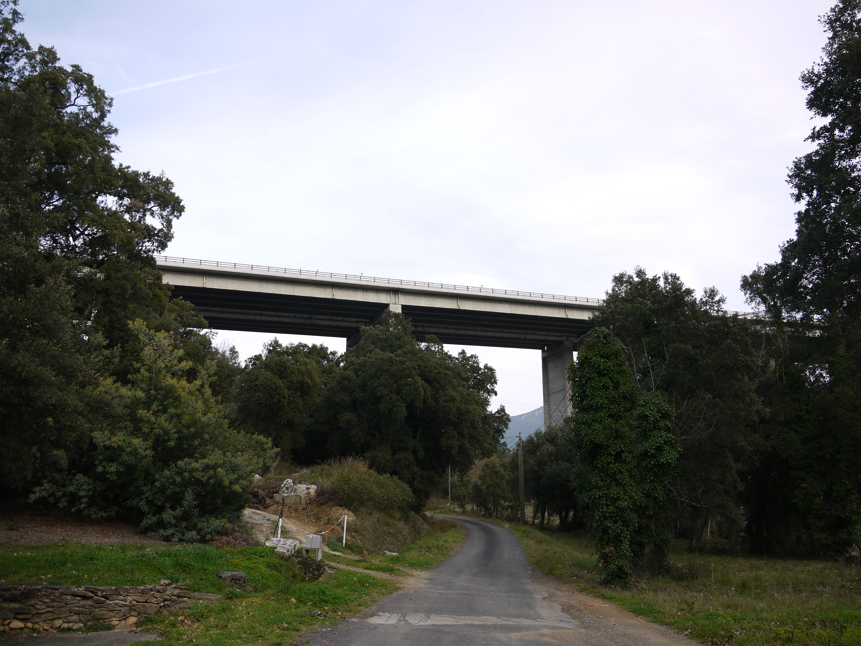 Une partie du Viaduc de Rome de l'A9 au-dessus de la route C5 à Les Cluses